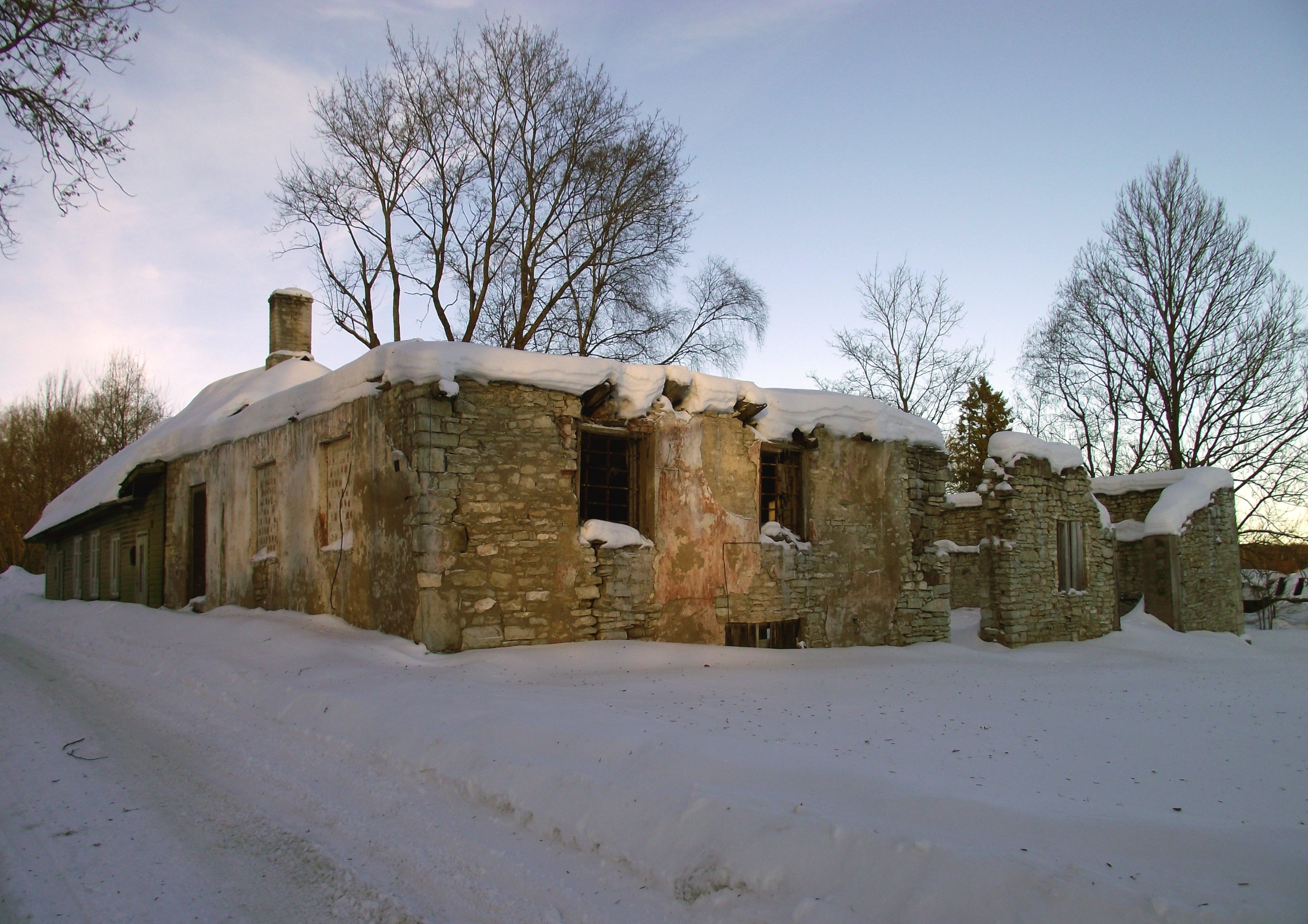 Simsoni vesiveski Paides